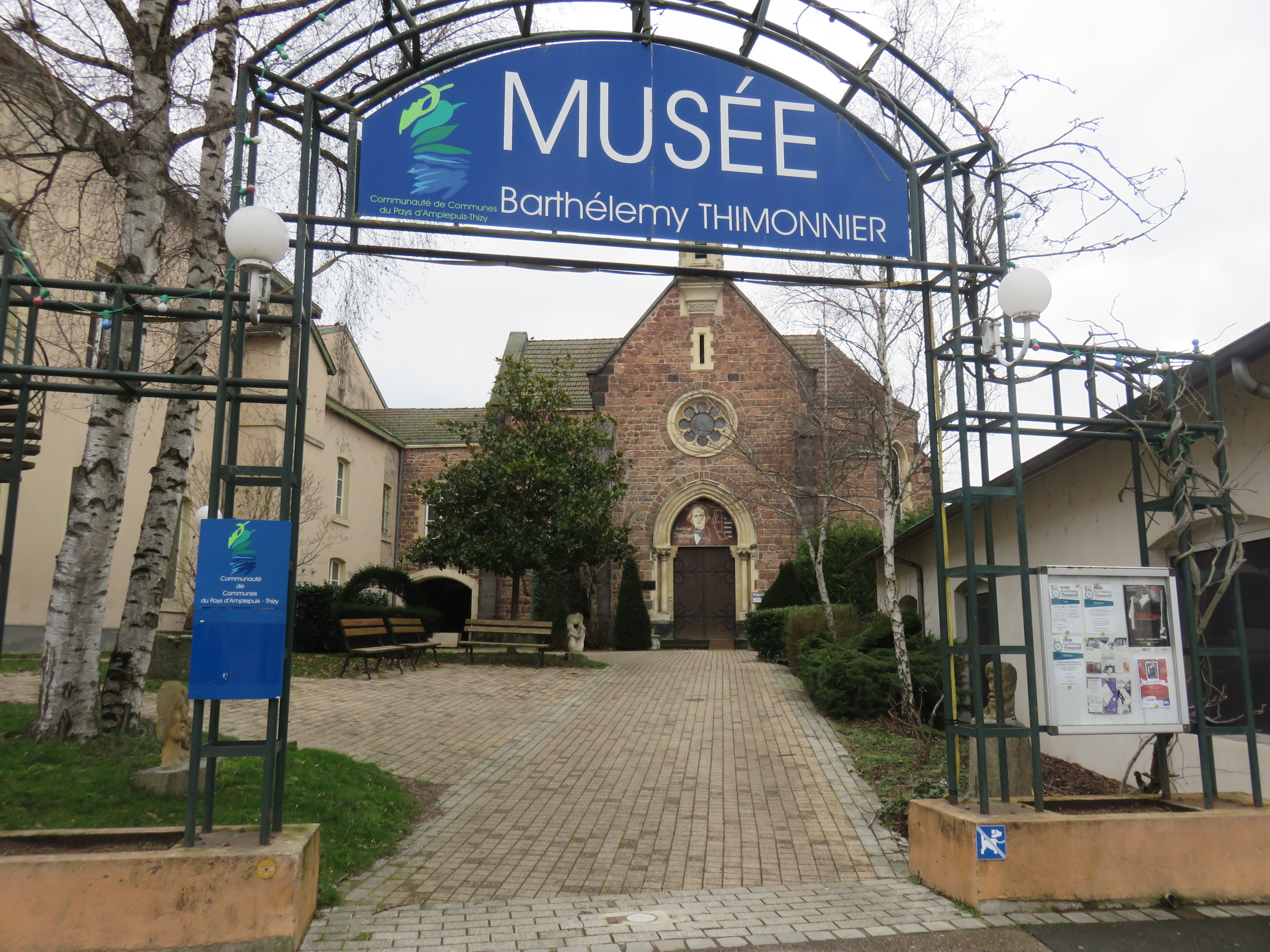 Musée Barthélémy Thimonnier à Amplepuis (Rhône, France) en février 2018.